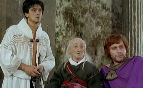 Screenshot from L’armata Brancaleone directed by Mario Monicelli